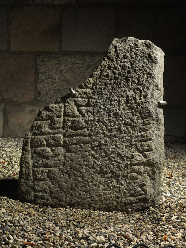 Foto: Nationalmuseet ved Roberto Fortuna